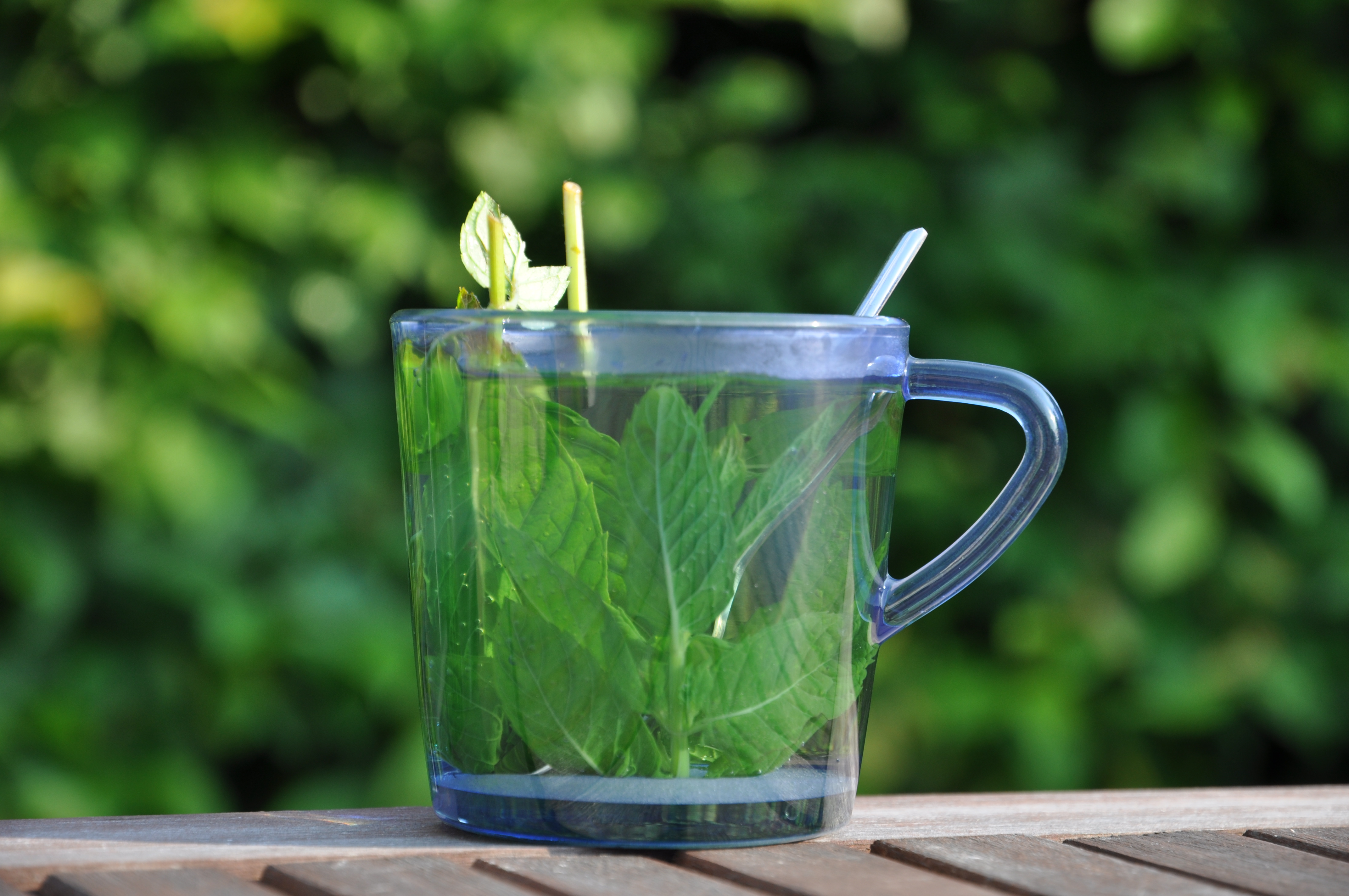 Een glas muntthee. Hiervoor wordt kokend water op de blaadjes van de aarmunt gegoten in een glas.